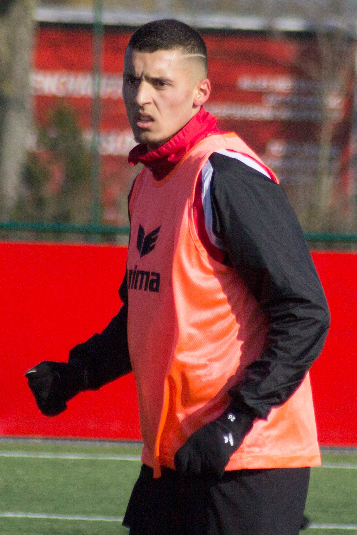 Entraînement du Royal Excel Mouscron, au Futurosport( Mouscron). Le 22 février 2018.